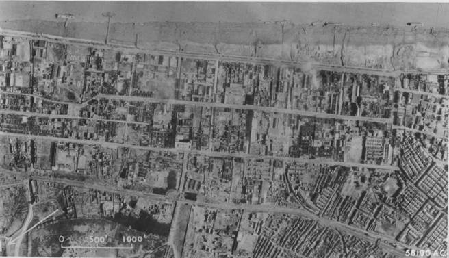 汉口（今中国武汉市江岸区等地）被美军轰炸后的惨状。